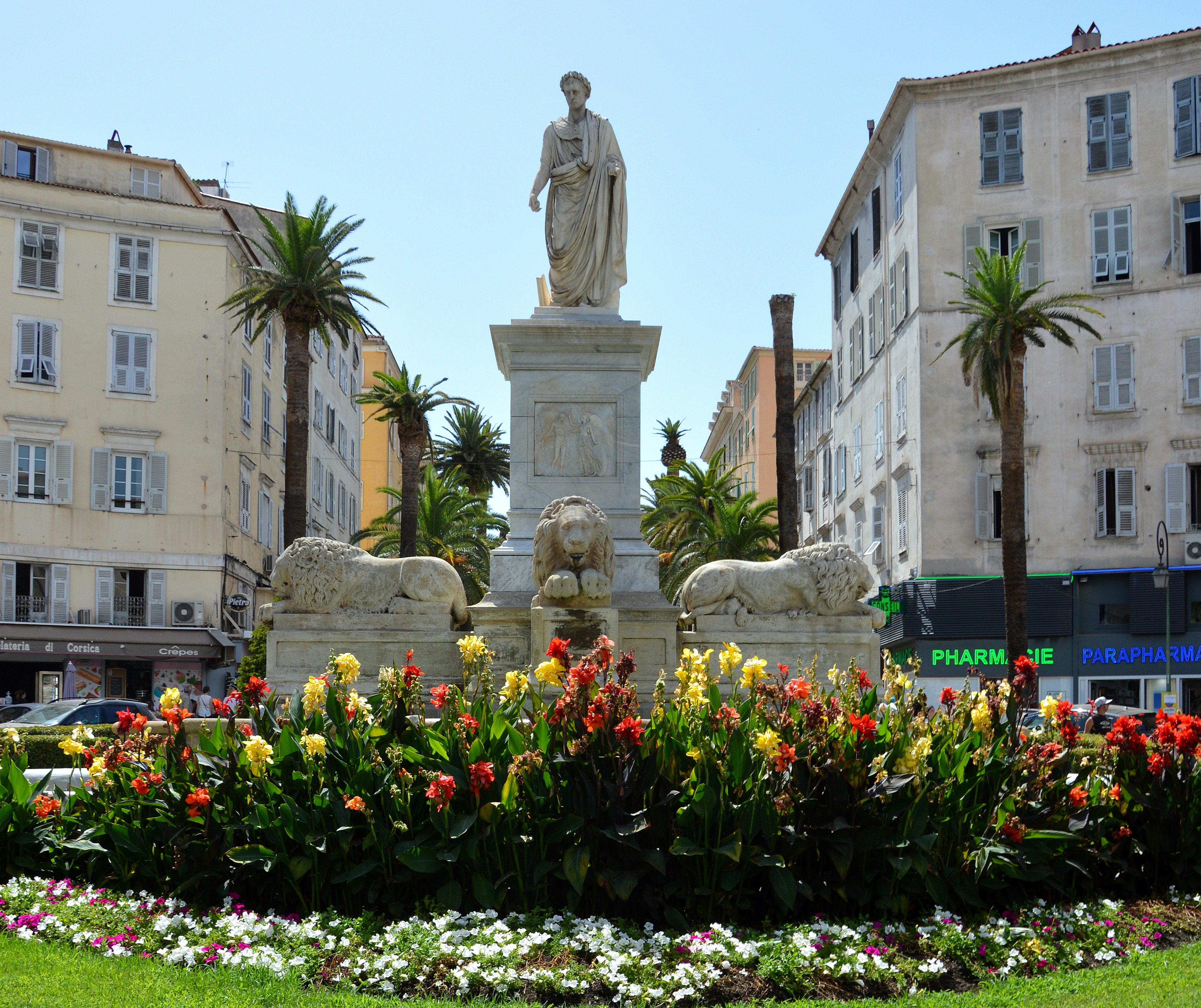 Napoleon-Denkmal mit Brunnen in Ajaccio